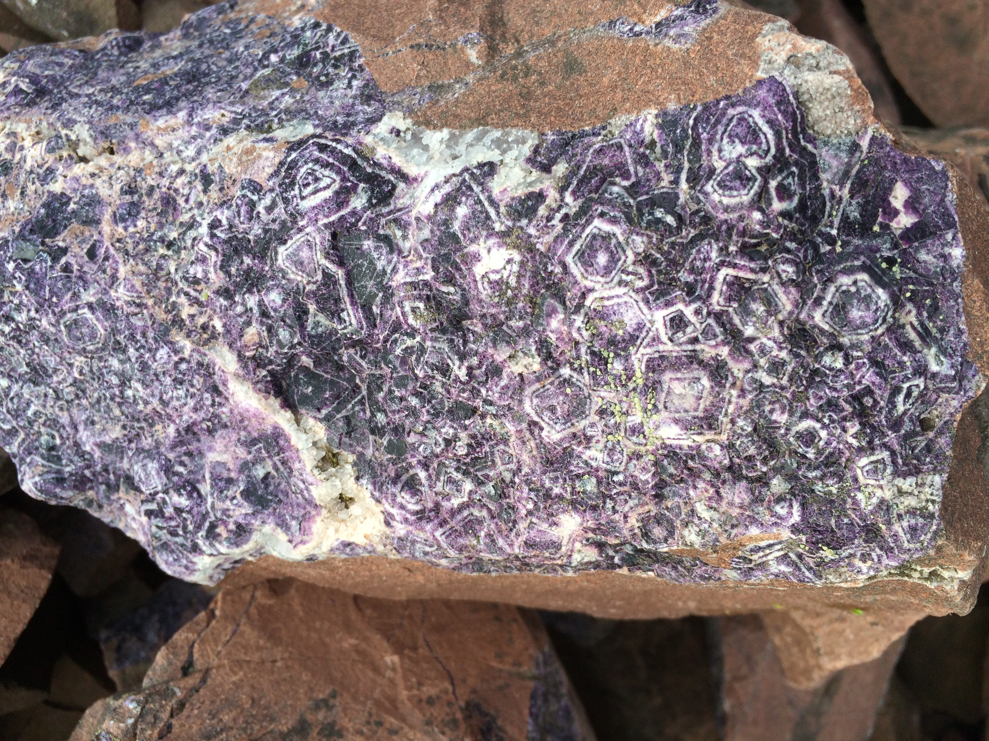 Флюорит и аметисты мыса Корабль